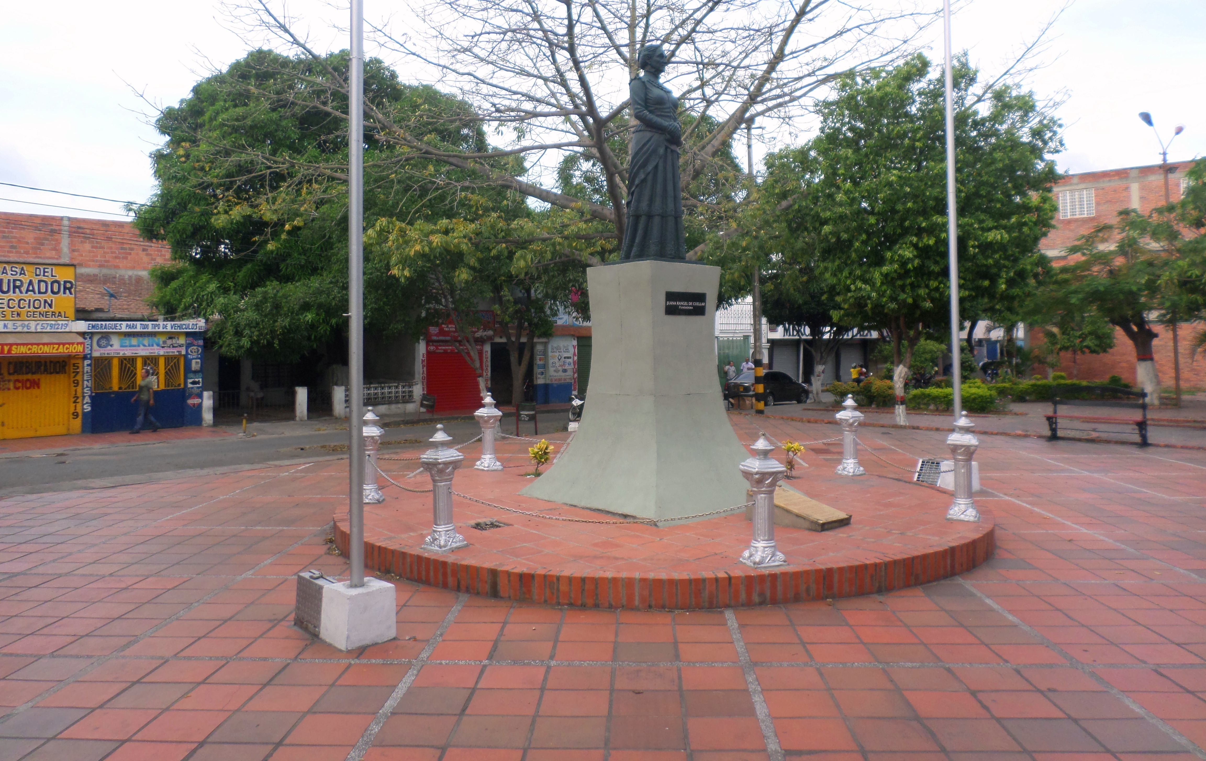 Parque Juana Rangel de Cuéllar en la diagonal santander Cúcuta NS, Colombia